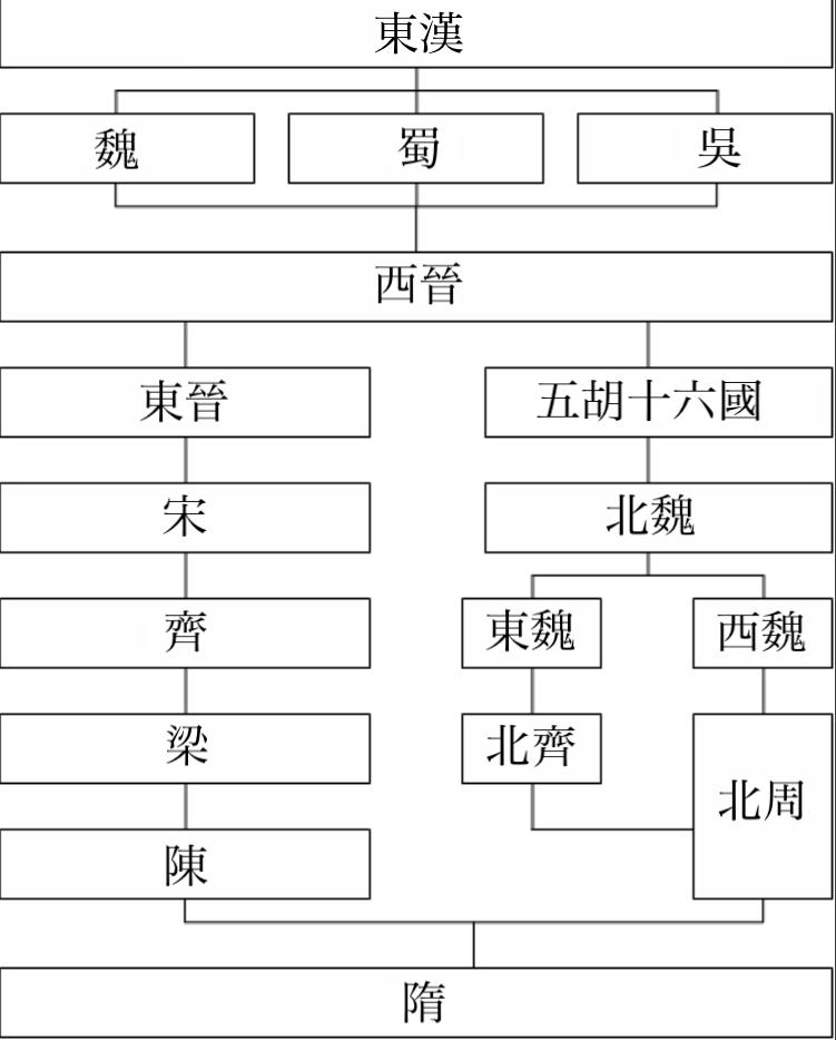 中文（香港）: 魏晉南北朝簡表,以及前後兩朝